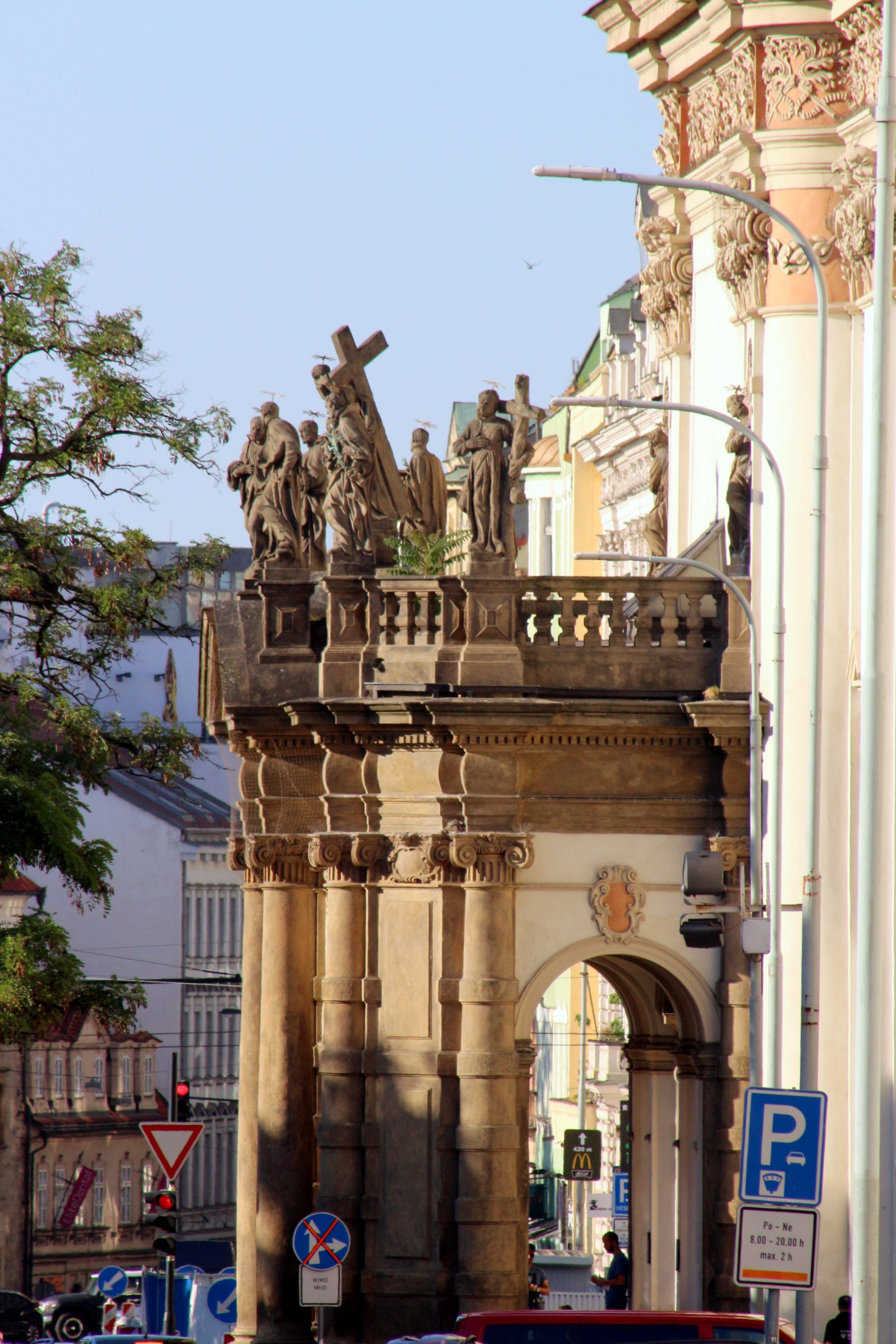 Kostel sv. Ignáce z Loyoly na Karlově náměstí